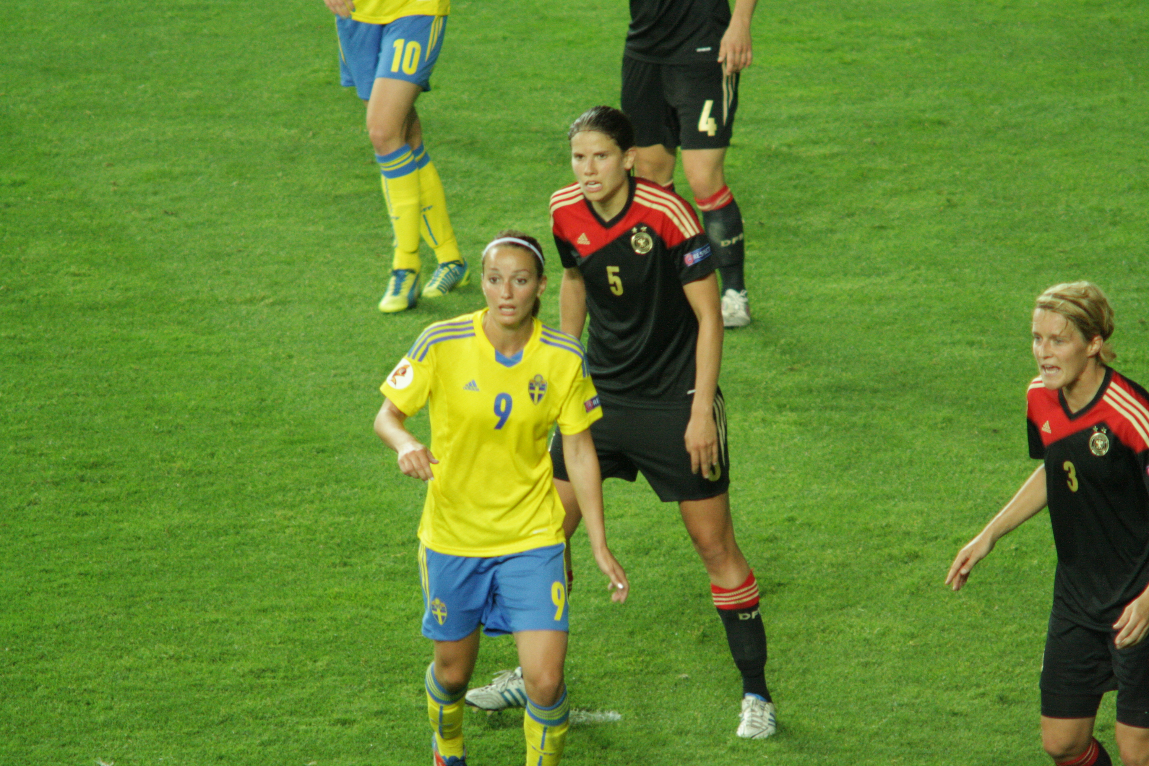 Asllani